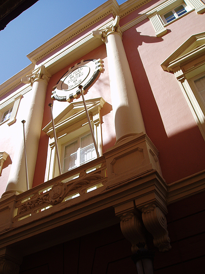 Museo de las Cortes de Cádiz. provincia de Cádiz, España.